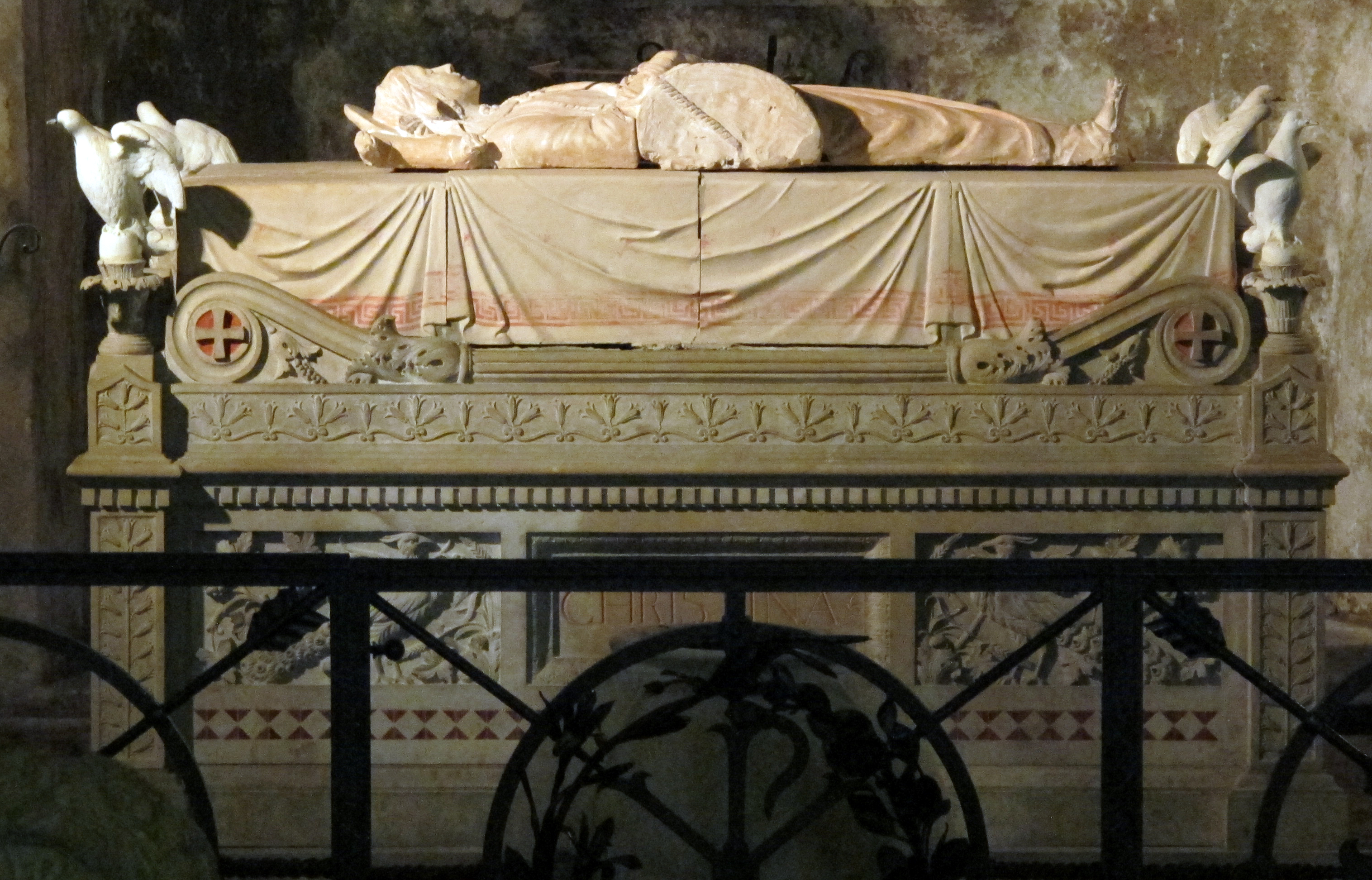 Santi Giorgio e Cristina (Bolsena) - Interno